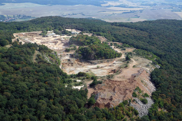 Tardos, vörös mészkő bánya légi fotón